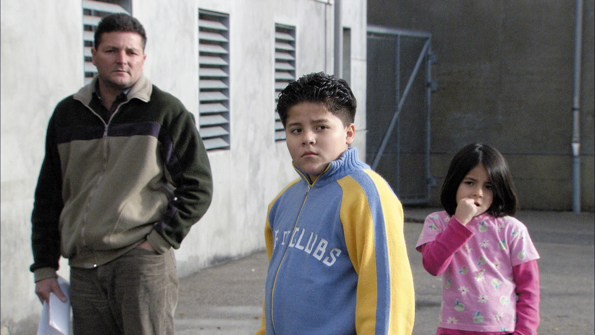 Famille colombienne dans la cour du centre d’enregistrement et de procédure pour requérant d’asile de Vallorbe. Image tirée du film « La forteresse » de Fernand Melgar